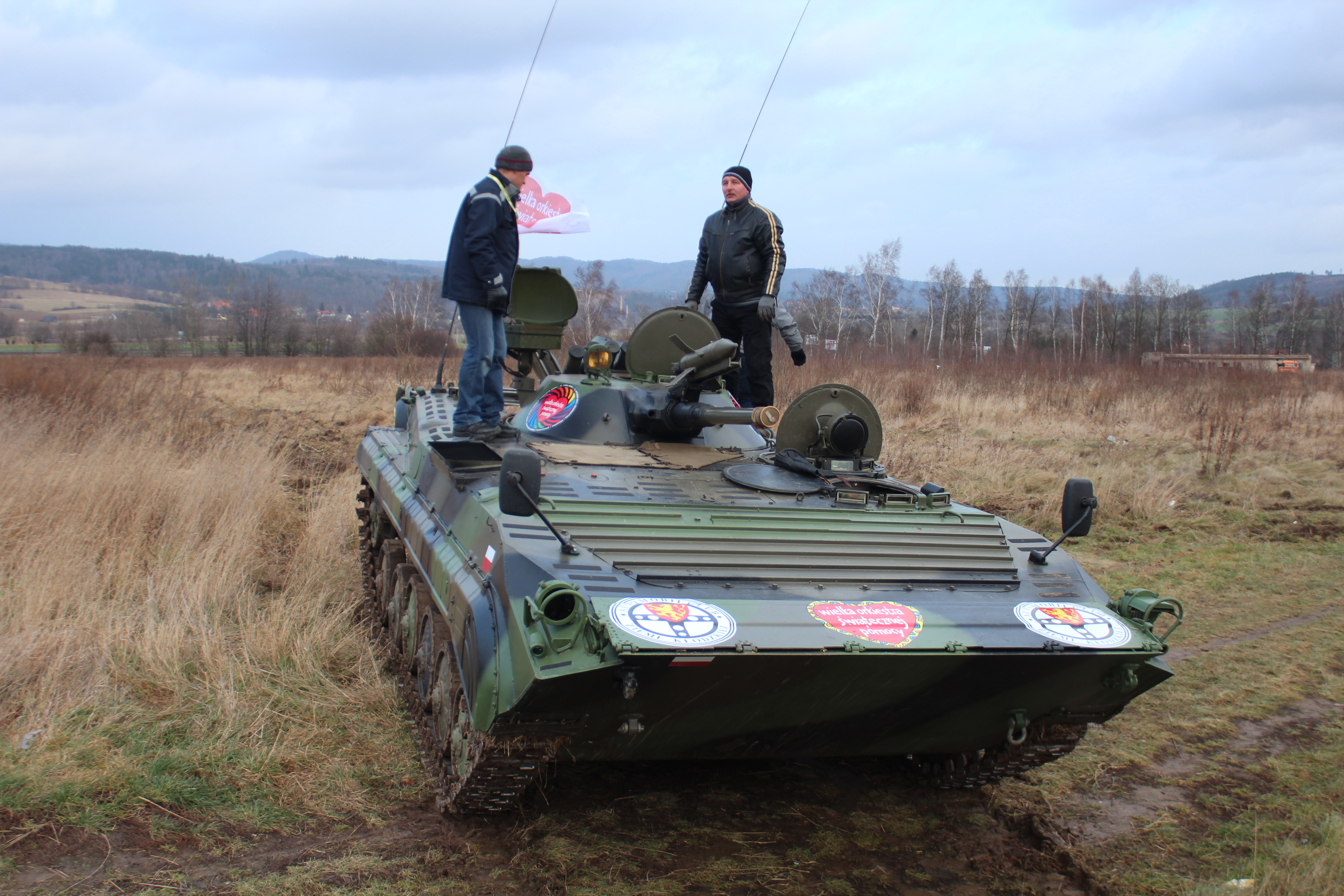 Automobilklub Ziemi Kłodzkiej przy współpracy ze sztabem Wielkiej Orkiestry Świątecznej Pomocy w Kłodzku był organizatorem imprezy pod nazwą Rajdowa Orkiestra. Wydarzenie to odbyło się w ramach 23 Finału Wielkiej orkiestry Świątecznej Pomocy w dniu 11 stycznia 2015 roku. Rajdowa WOŚP wsparła ogólnonarodową akcje WOŚP kwotą 5 374zł złotych. Dziękujemy zawodnikom, działaczom i wszystkim tym, którzy wzięli udział w przedsięwzięciu oraz tym którzy wsparli organizację naszej imprezy.